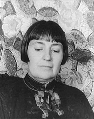 Carl Van Vechten, Portrait of Mabel Dodge Luhan (1879-1962), 1934